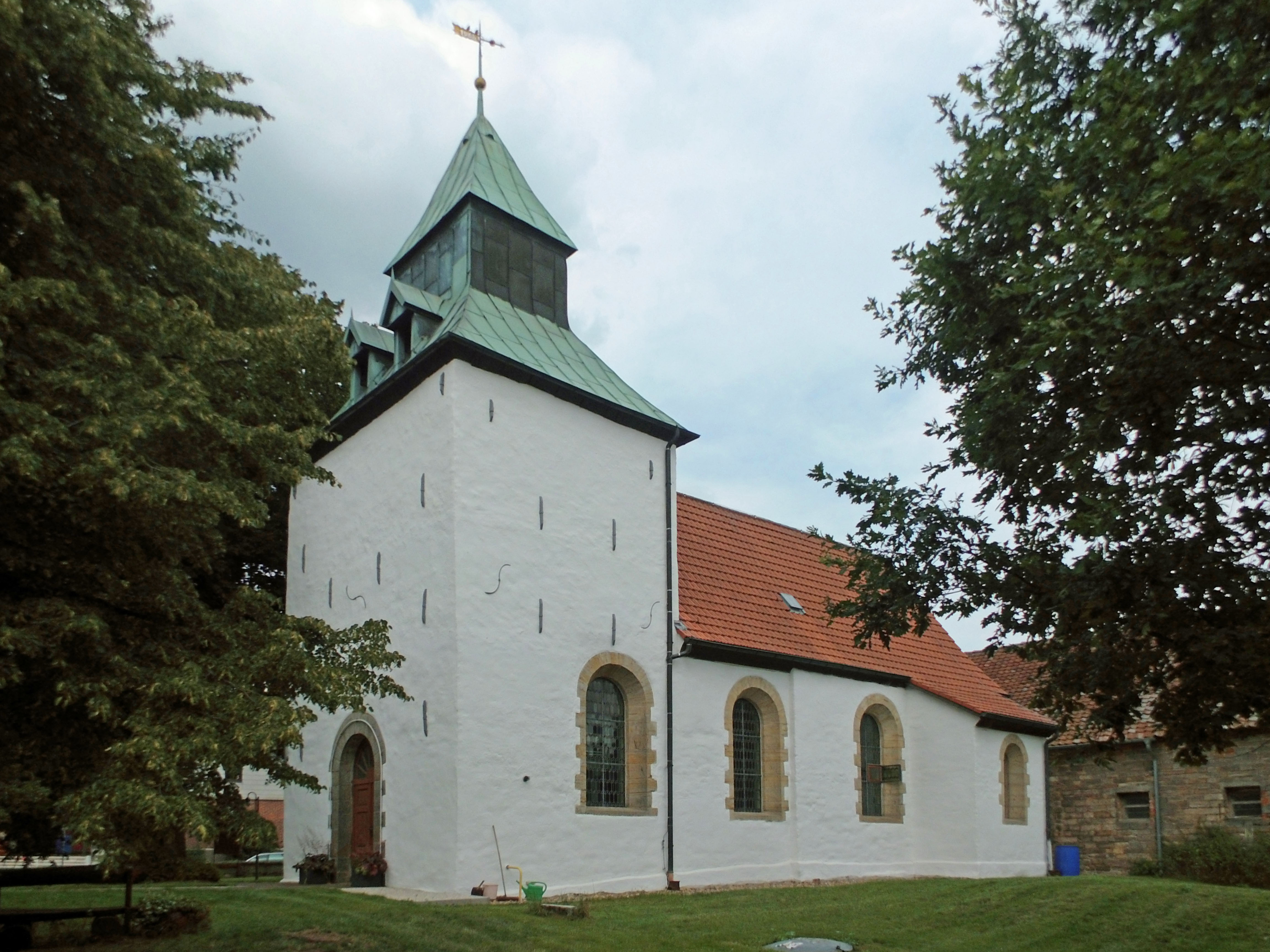 Evangelisch-lutherische Kirche St. Marien in Rottorf am Klei, Hasenwinkel (Landkreis Helmstedt)